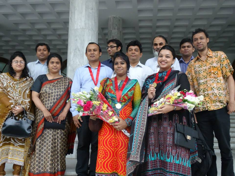 ঢাকা বিশ্ববিদ্যালয়, পরিসংখ্যান গবেষণা ও শিক্ষণ ইনস্টিটিউট (আই.এস.আর.টি) এর স্যারদের সাথে বিজ্ঞান অনুষদের ডীন সম্মাননা (২০১৩) বিজয়ী দুজন শিক্ষার্থী।